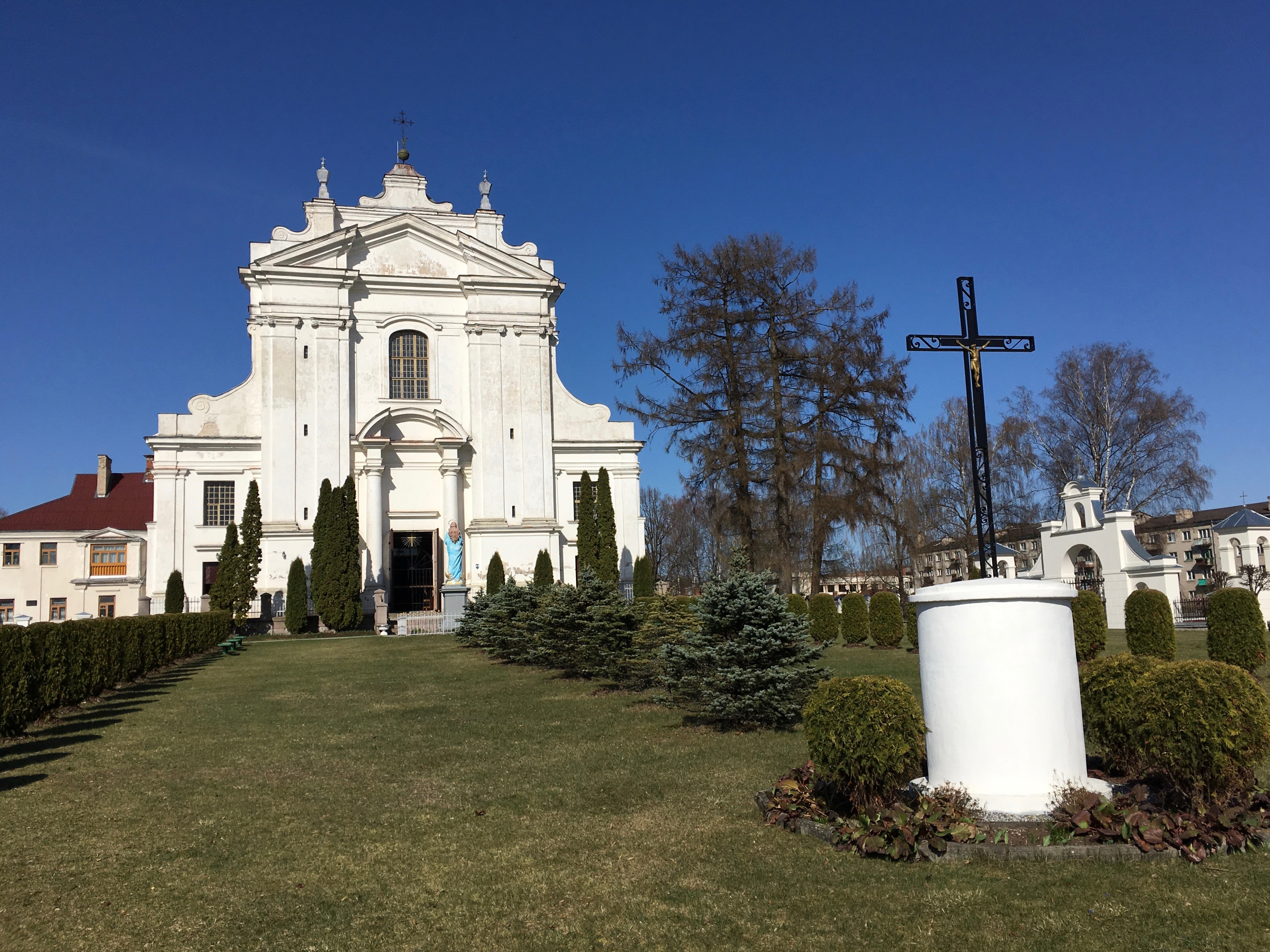 Krāslavas sv. Ludvika baznīca